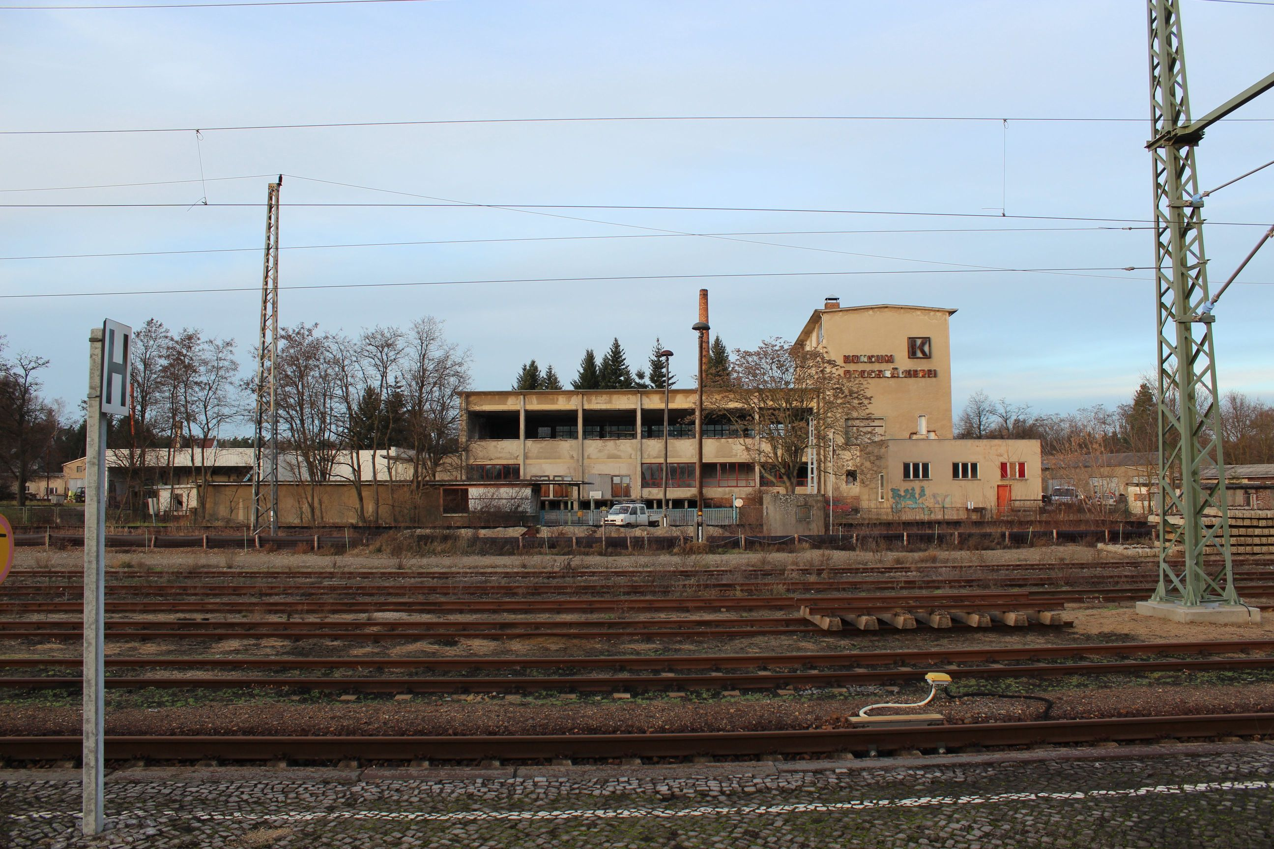 Bahnhof Elsterwerda-Biehla.